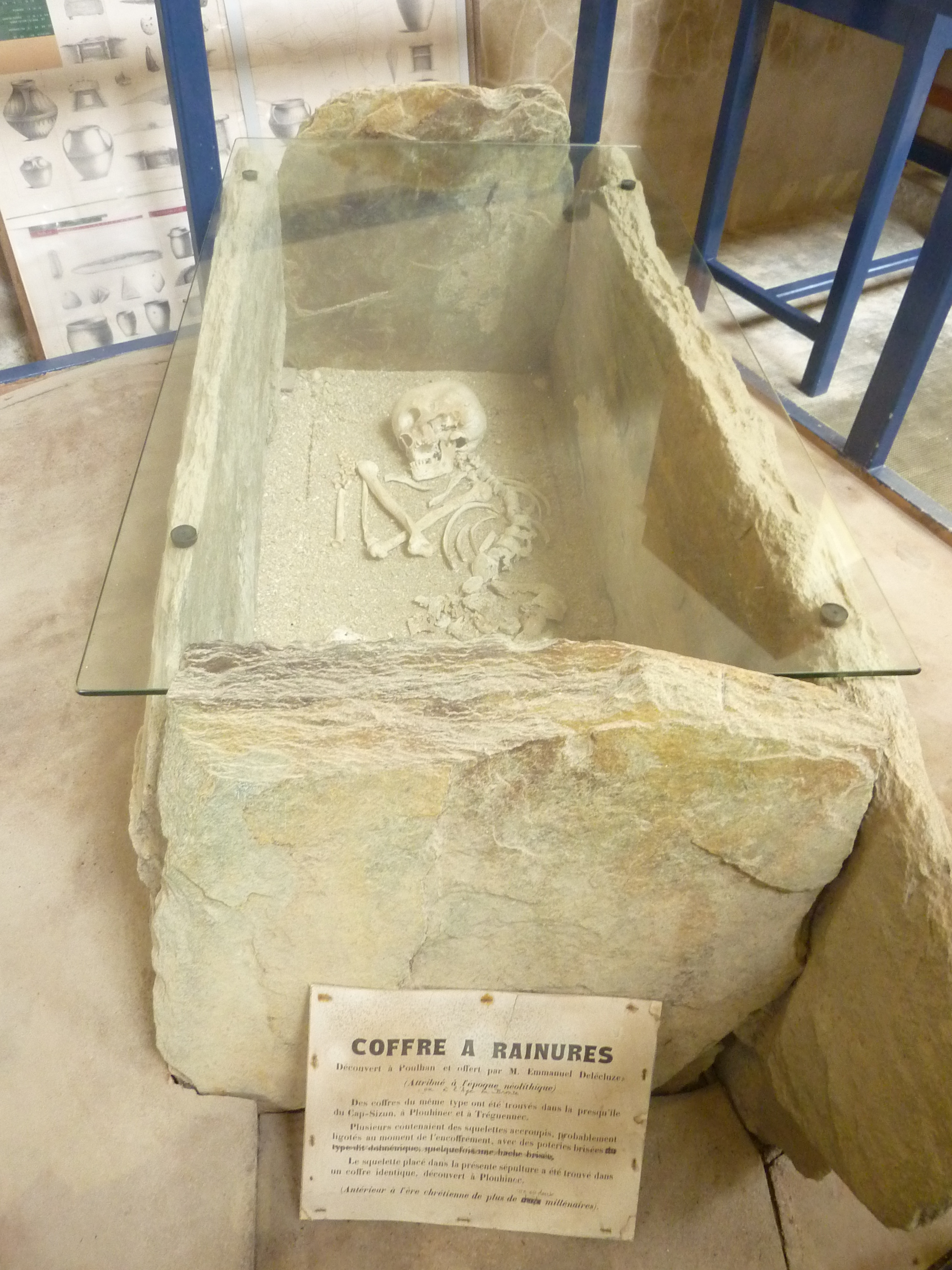 Squelette trouvé à Plouhinec (Finistère), placé dans un coffre à rainures trouvé à Poullan-sur-Mer, datant de l'âge du bronze (ou du néolithique). Plusieurs coffres du même type, contenant des squelettes accroupis et des poteries brisées, ont été trouvés dans le Cap Sizun ainsi qu"à Tréguennec (Finistère) (Musée de la préhistoire finistérienne de Penmarc'h)